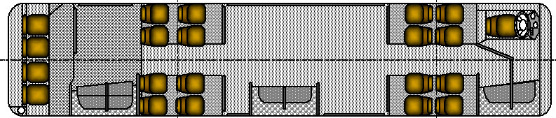 Варіант планування салону автобуса MAN SL 223 виробництва Man Kamyon Ve Otobus San AS (Туреччина) із 20 сидіннями